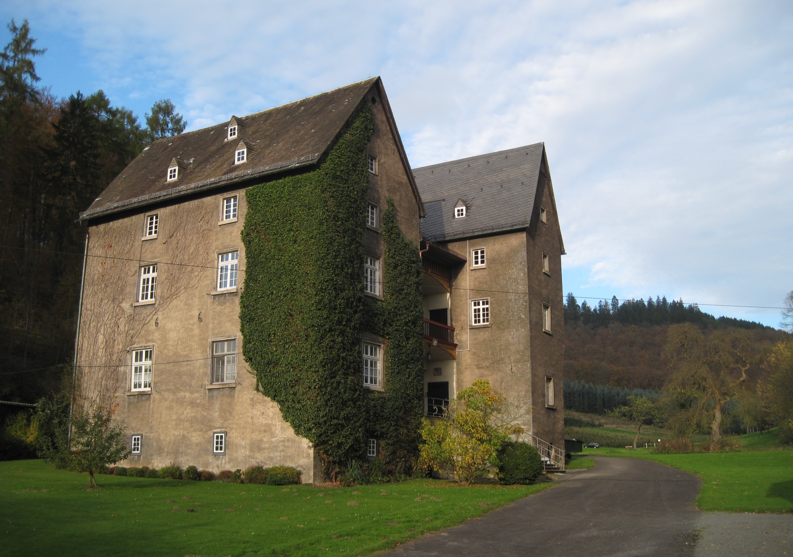 Schloss Brüninghausen in Plettenberg-Ohle, Brüninghausen 1. This image shows a heritage building in Germany, located in the North Rhine-Westphalian city Plettenberg (no. 71).